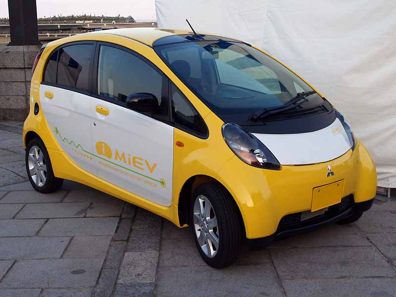 三菱iをベースに開発された電気自動車"MiEV"。2007年6月2日、横浜赤レンガ倉庫広場で開催されたエコカーワールドにてComyu撮影。